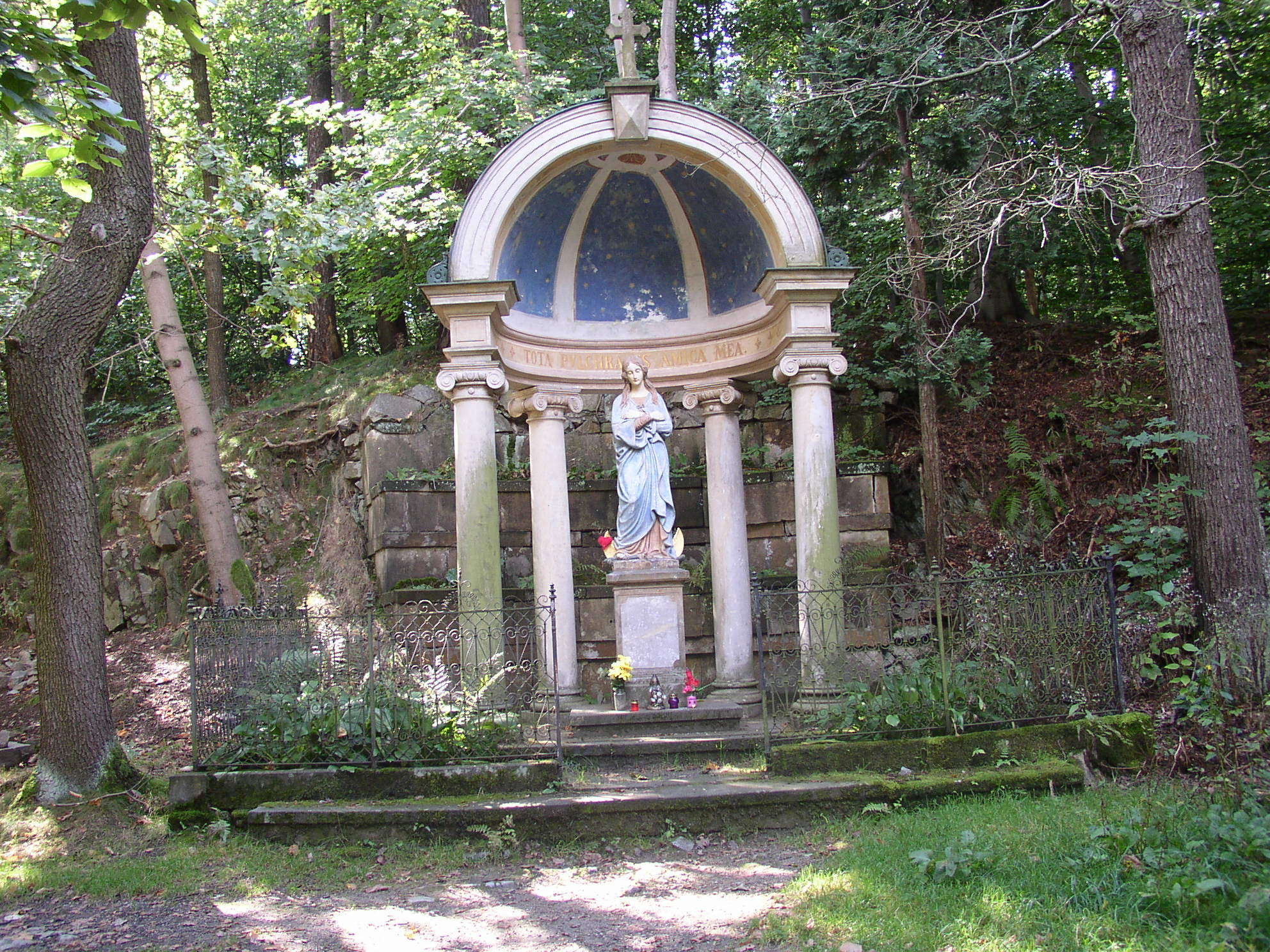 Gloriet se socou Panny Marie, areál Kaple Ukřižování, Jiřetín pod Jedlovou.